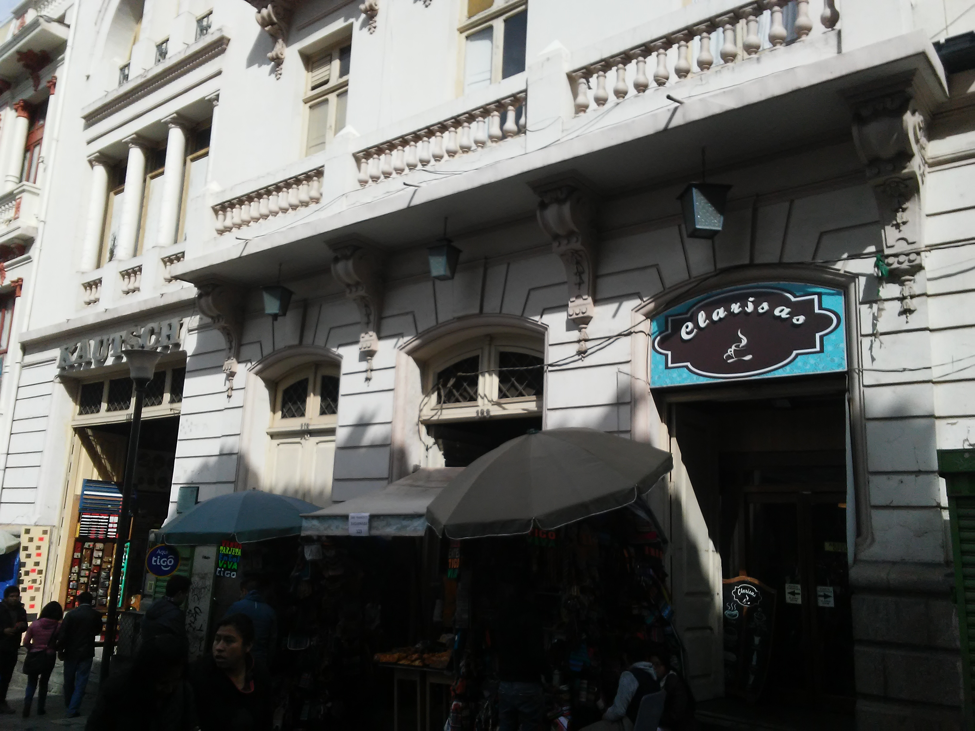 Edificio Ferretería Kautsch This medium shows the protected monument with the number L/00-116 in Bolivia.